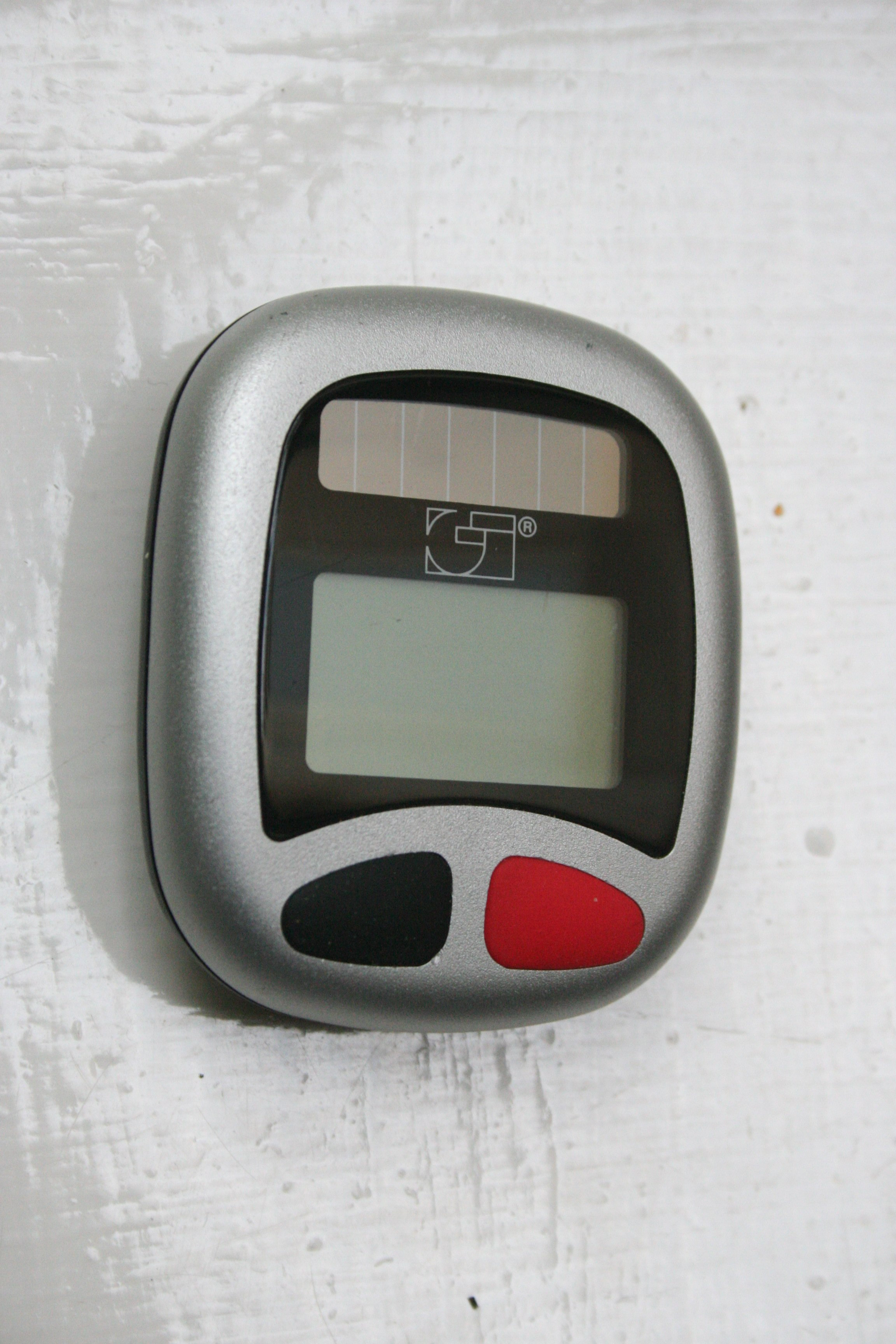 Fahrradcomputer von General Technic aus den frühen 90ern